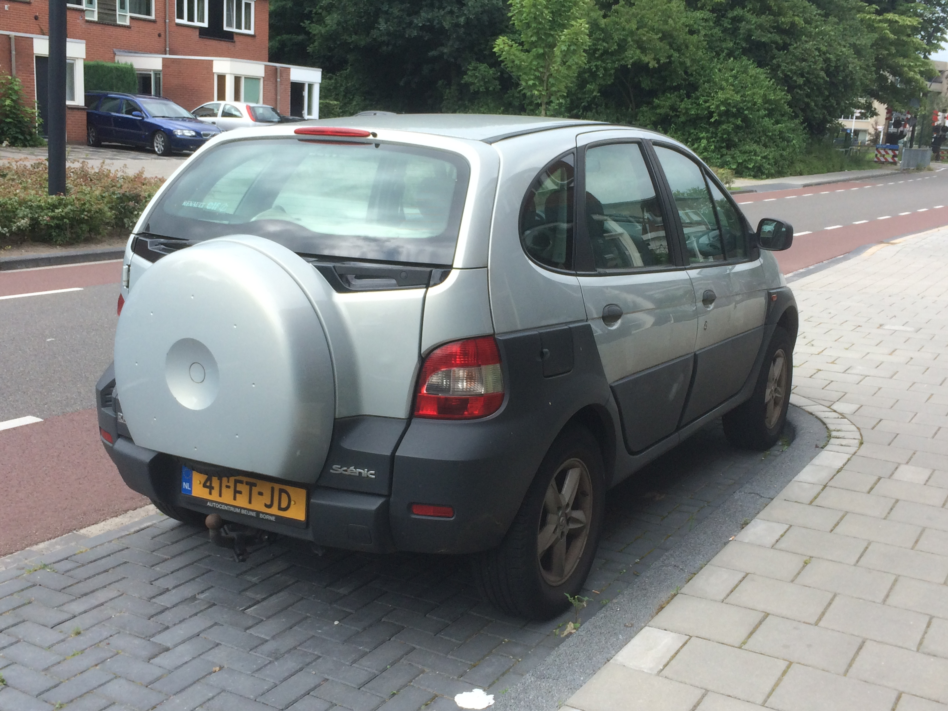 THE back of a 2000 Renault scenic rx4